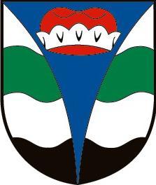 Vápenný Podol znak